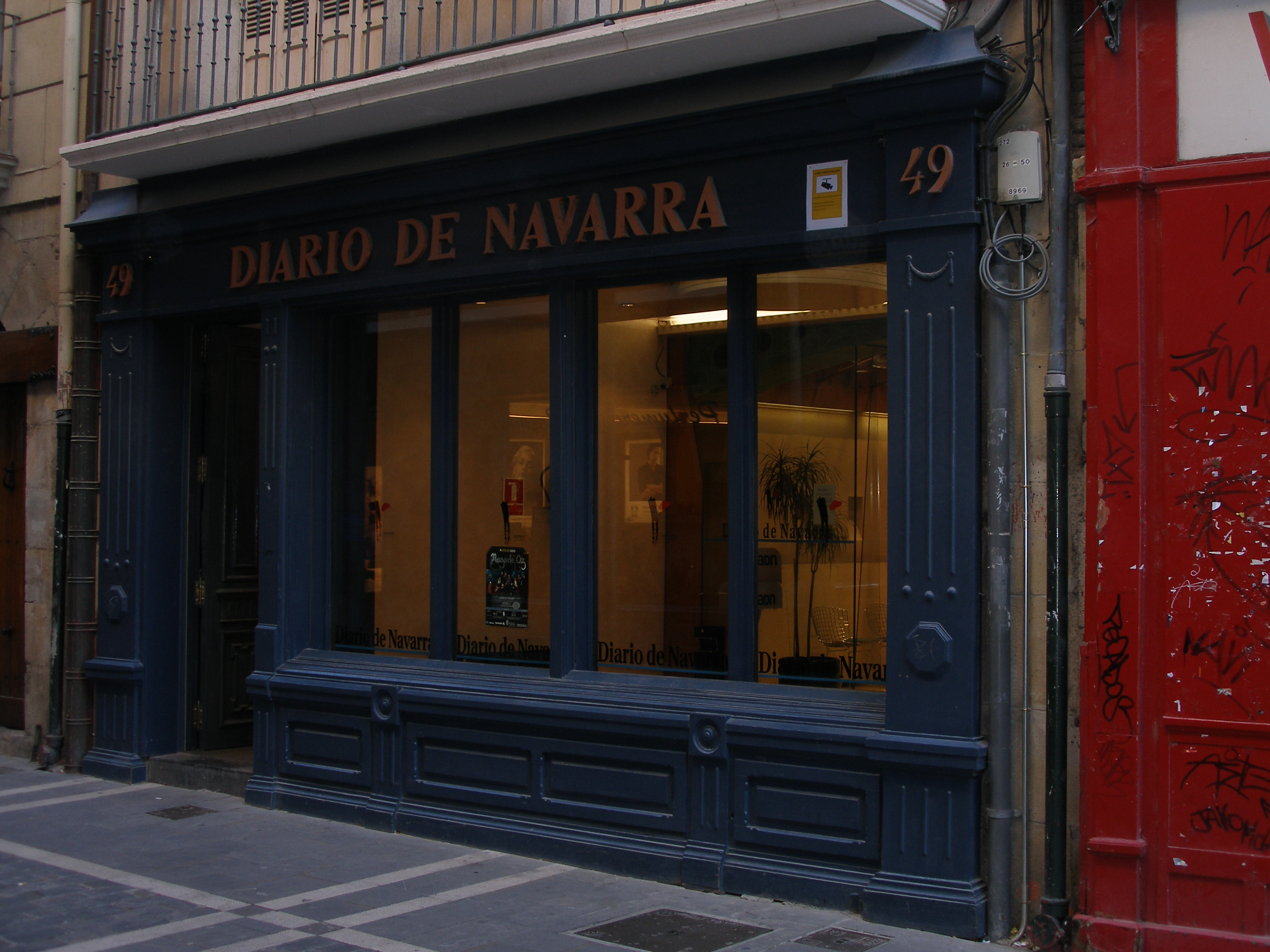 Oficinas del Diario de Navarra en la calle Zapatería